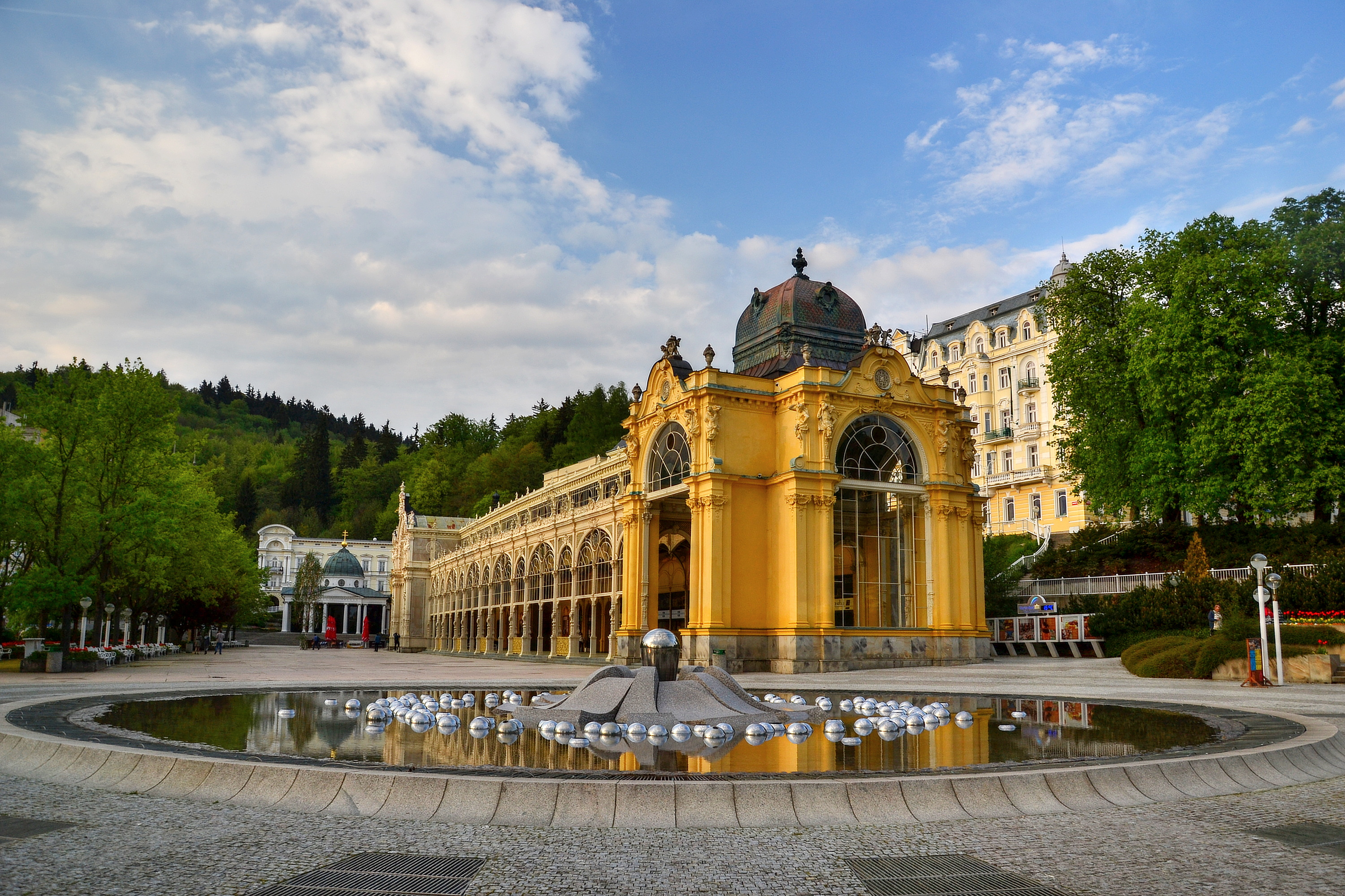 Kolonáda Maxima Gorkého, Mariánské Lázně.